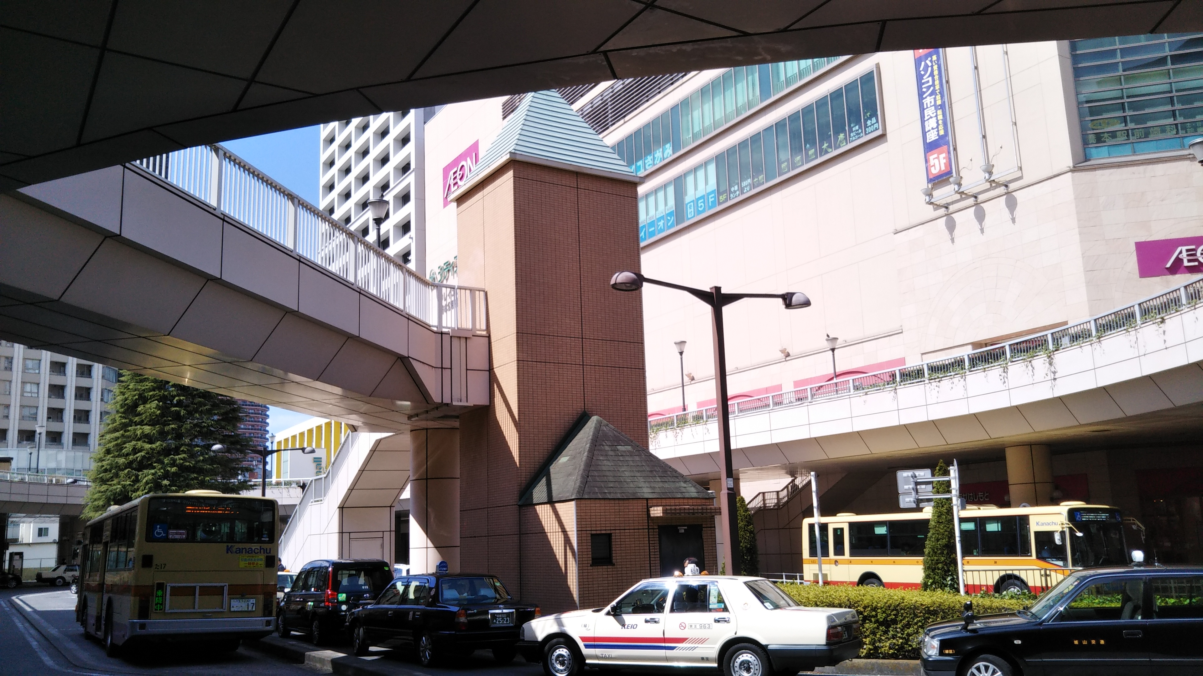 橋本駅の北口ロータリー